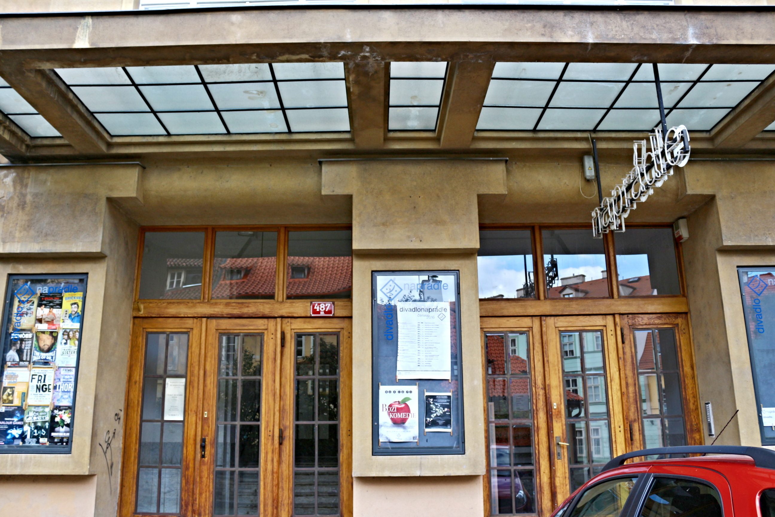 Divadlo Na Prádle